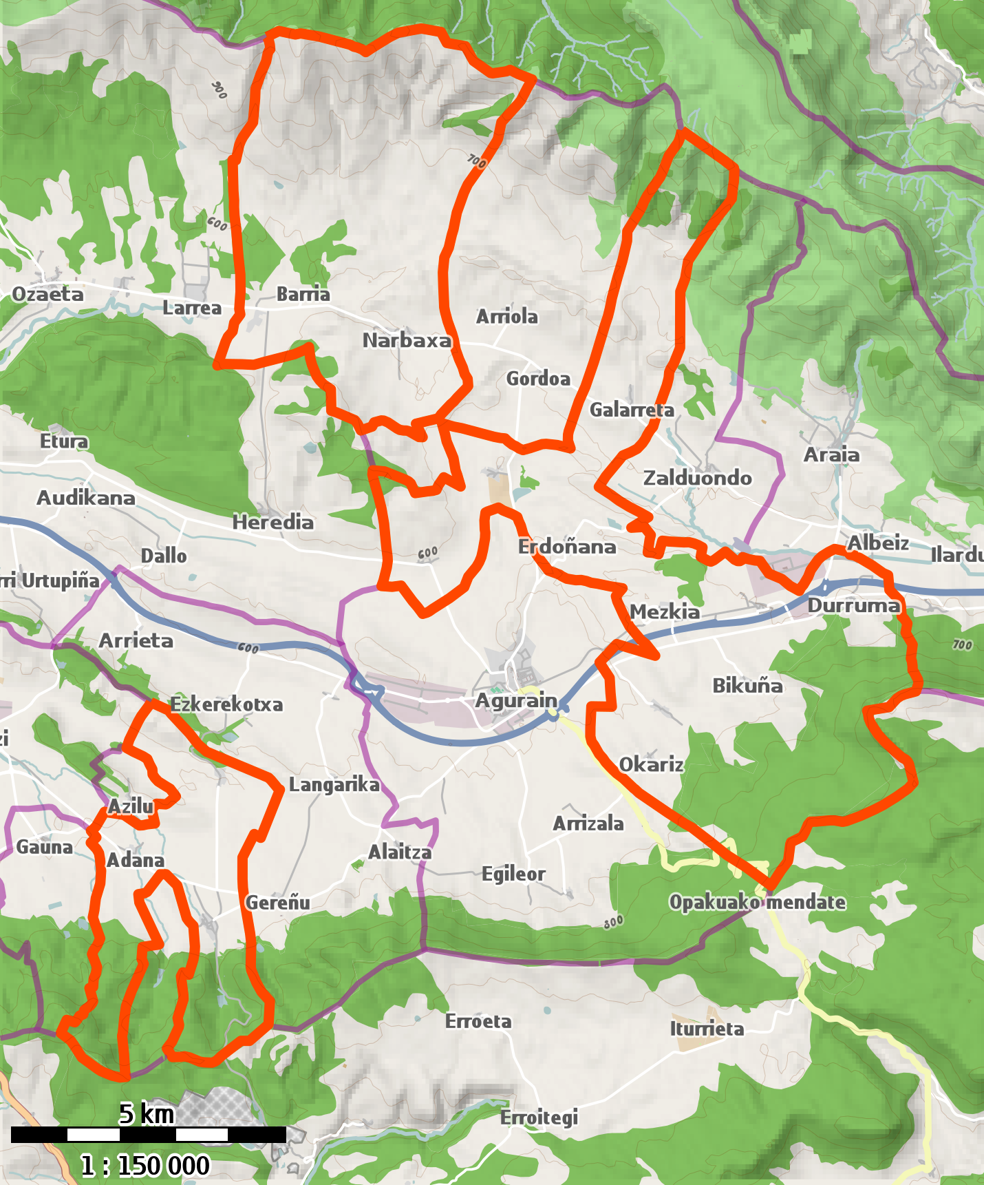 Donemiliaga udalerria OSM 2016